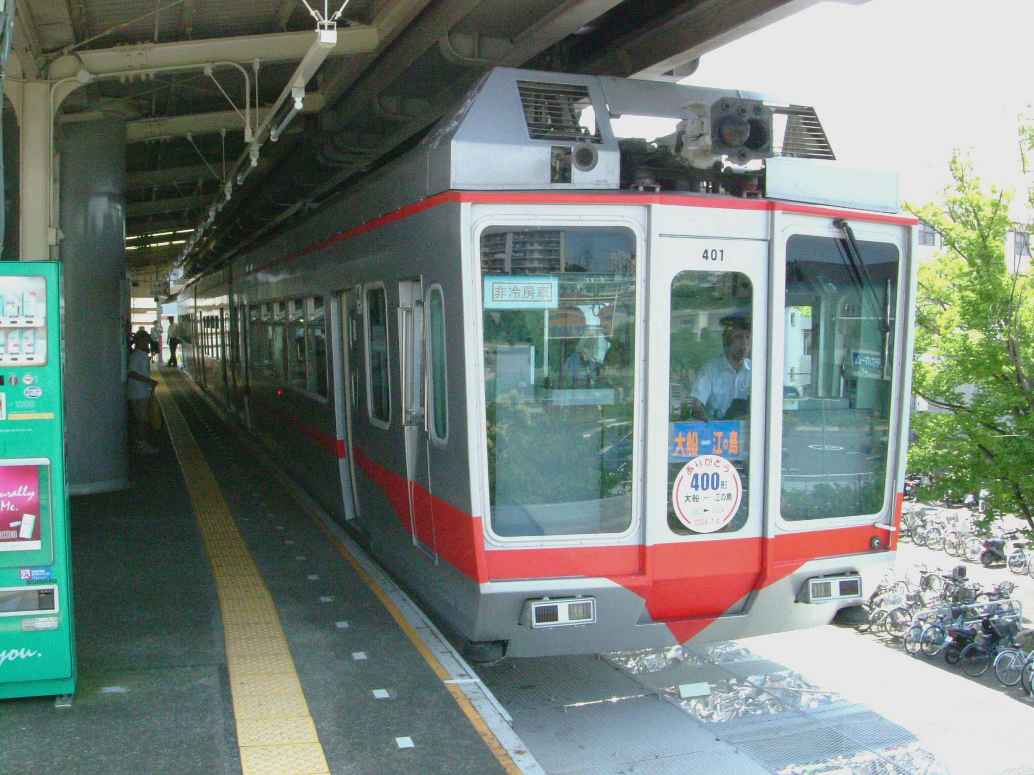 さよなら運転の際の湘南モノレール400形。湘南深沢駅にて撮影。